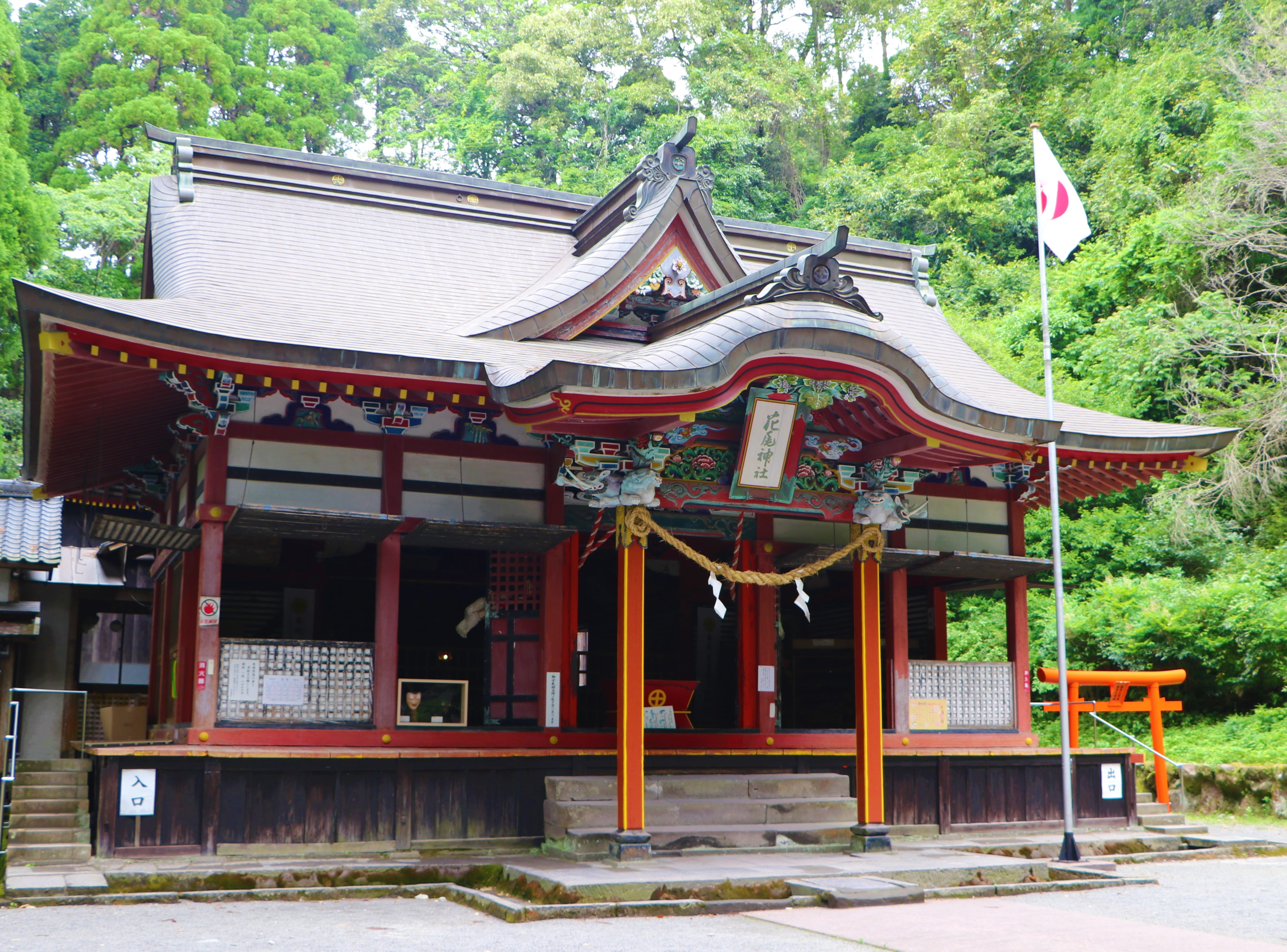 鹿児島市花尾町にある花尾神社本殿。